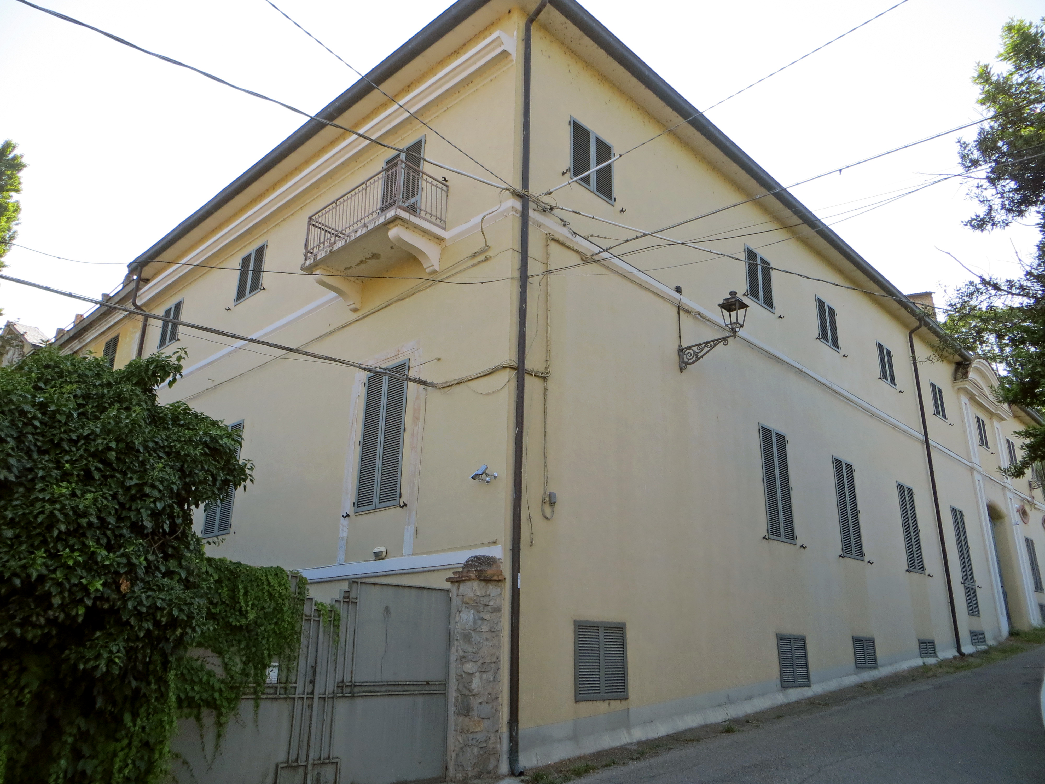 Villa Carpintero (San Vitale Baganza, Sala Baganza) - facciata e lato nord